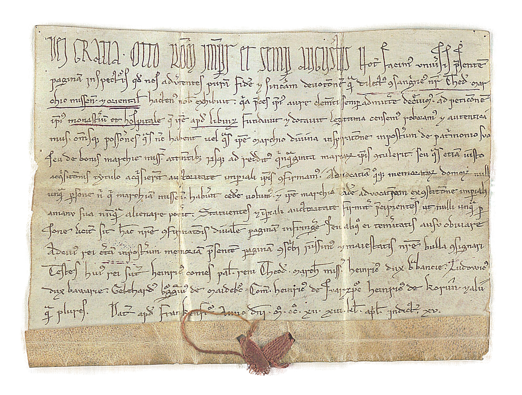 Von Kaiser Otto IV. auf dem Frankfurter Reichstag am 20. März 1212 besiegelte Gründungsurkunde des Augustiner-Chorherrenstifts zu St. Thomas in Leipzig und seines Hospitals St. Georg („Spittal sente Jorgen“).Diese Urkunde gilt ebenfalls als Gründungsurkunde der zum Stift gehörenden Klosterschule und ihres Knabenchores, obwohl in der Urkunde nur die Gründung eines namenlosen Klosters und Hospitals (monasterium et hospitale) bestätigt wird und das eigentliche Gründungs- oder Stiftungsdatum fehlt. Die Vergangenheitsform fundavit et dotavit („begründet und beschenkt“) besagt nur, dass die Gründung bei Ausfertigung der Urkunde schon stattgefunden hatte. Eine Kirche, eine Schule oder ein Chor werden in der Urkunde nicht erwähnt.